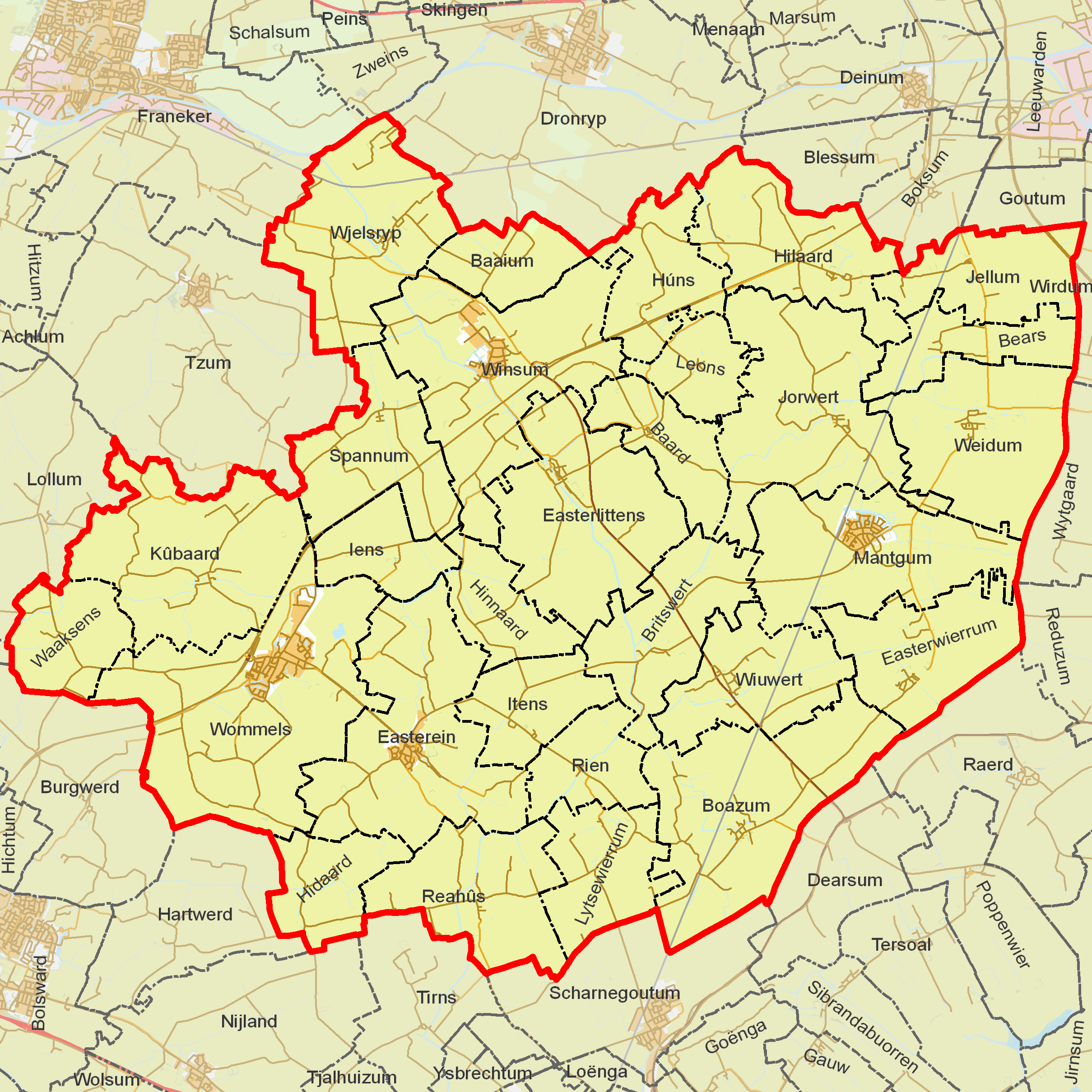 BAG woonplaatsen - Gemeente Littenseradiel.png